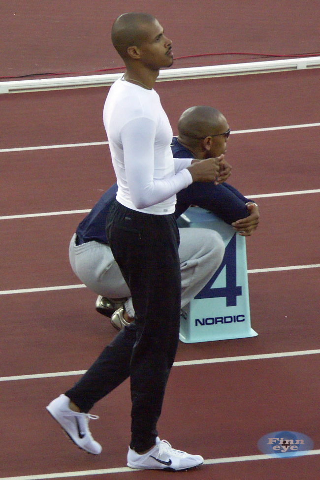 Felix Sanchez World championships 2005 Helsinki. Mise en ligne le 25 juillet 2007